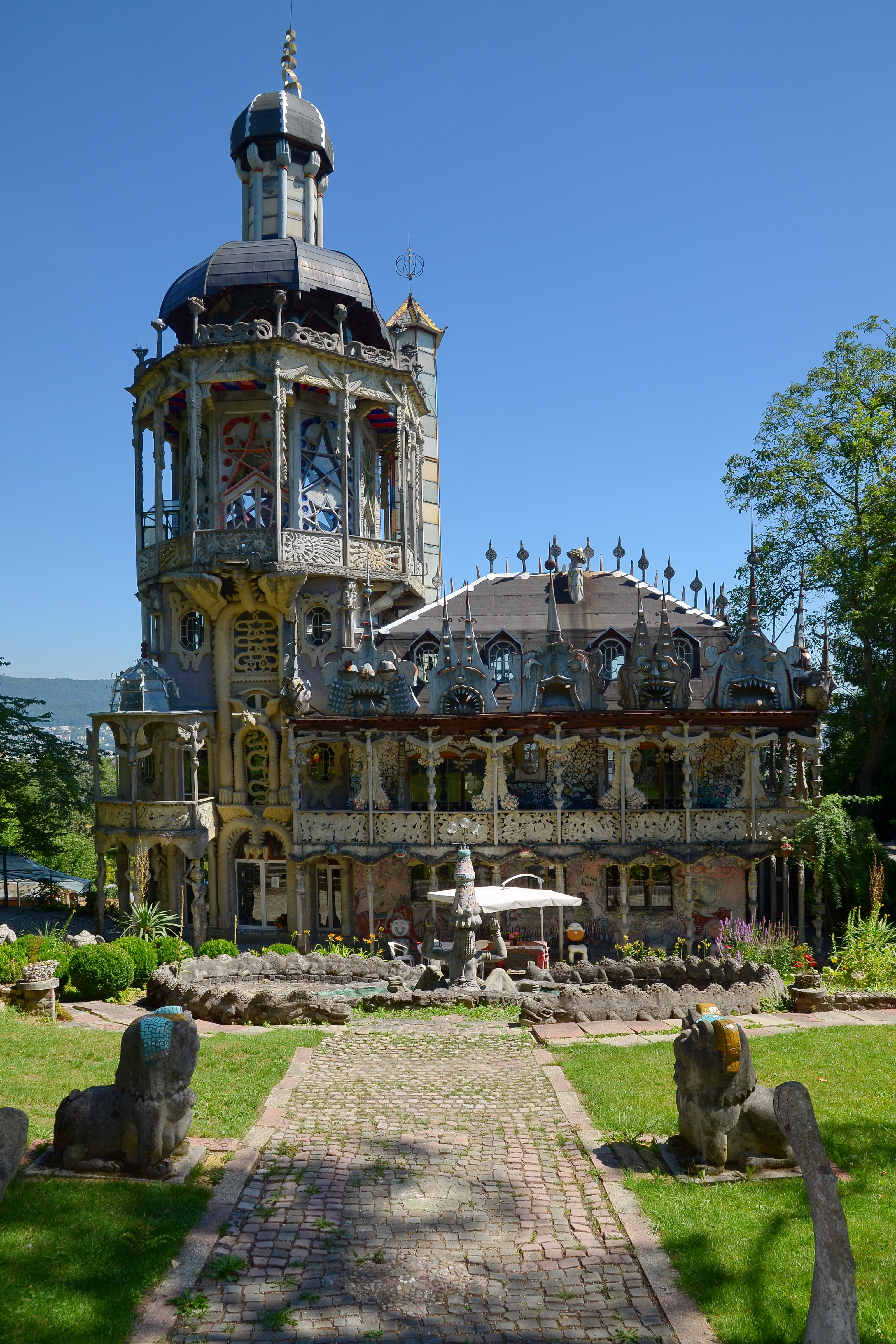 Bruno Weber Skulpturenpark in Dietikon - Spreitenbach (Switzerland)